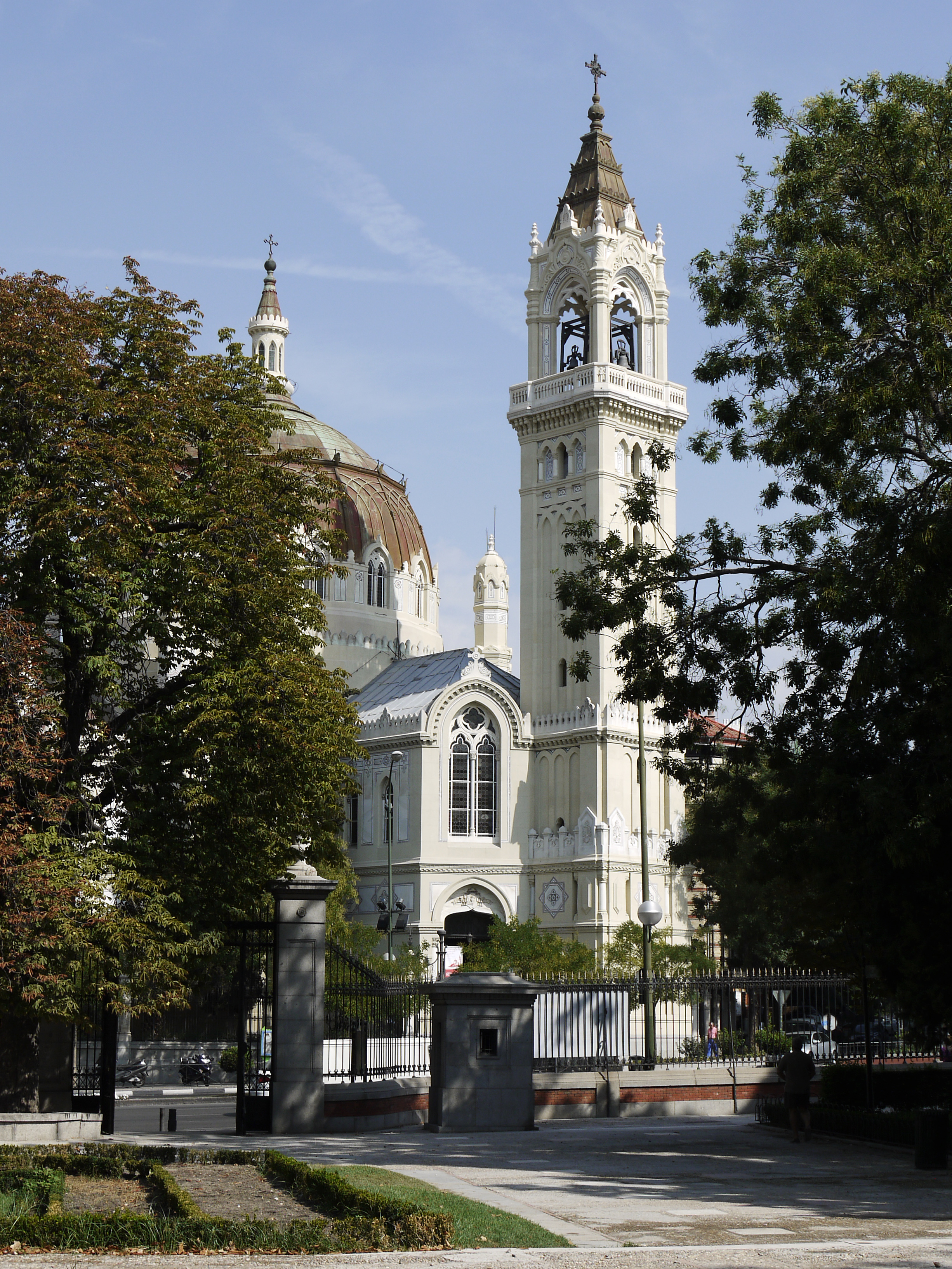 Iglesia Parroquial de San Manuel y San Benito. Orden de San Agustín. Madrid. España.